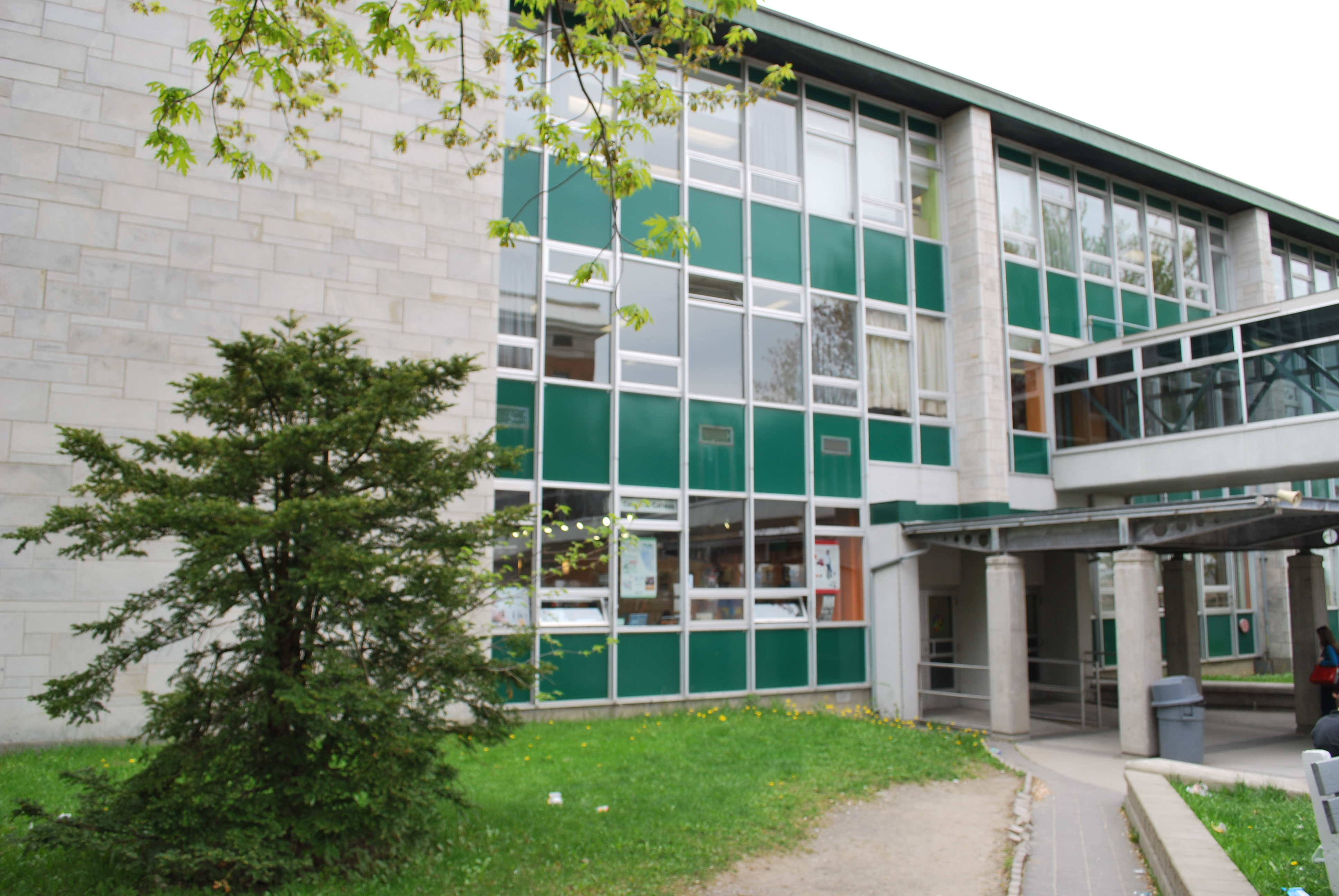 Pavillon du Collège François-Xavier-Garneau, à Québec